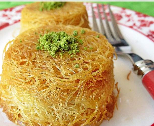 Tel Kadayıf Tatlısı